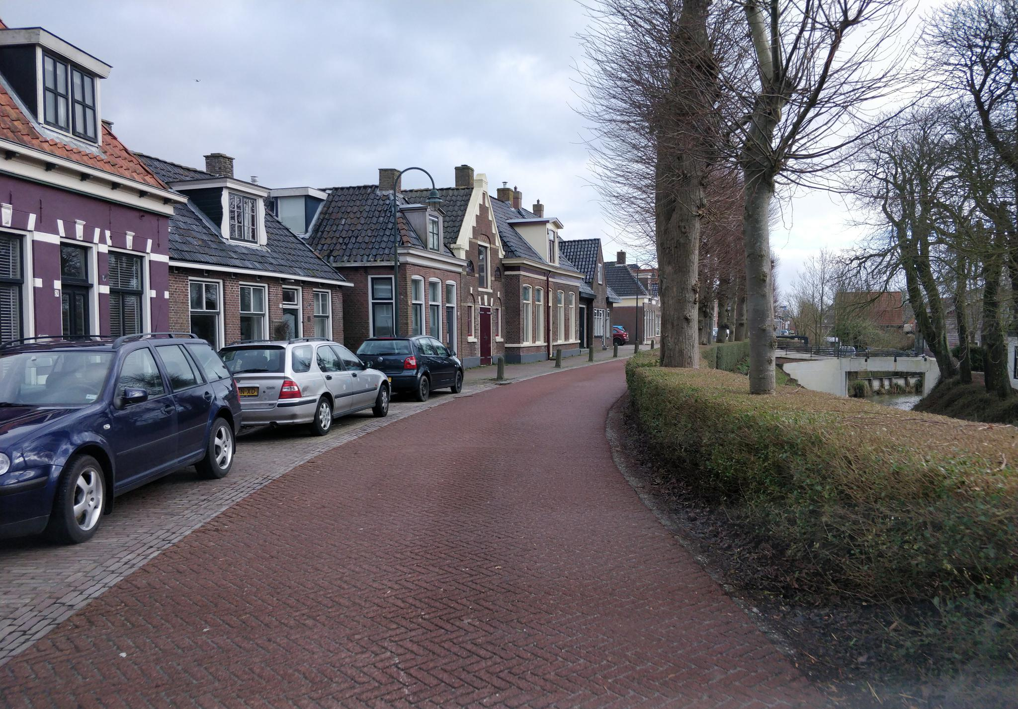 Oudebildtdijk, Oude Bildtzijl, Netherlands